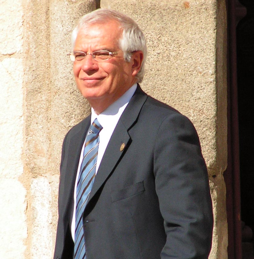 Josep Borrell, presidente del Paramento Europeo, en la XV Cumbre Iberoamericana que tuvo lugar en Salamanca (España), en octubre de 2005.